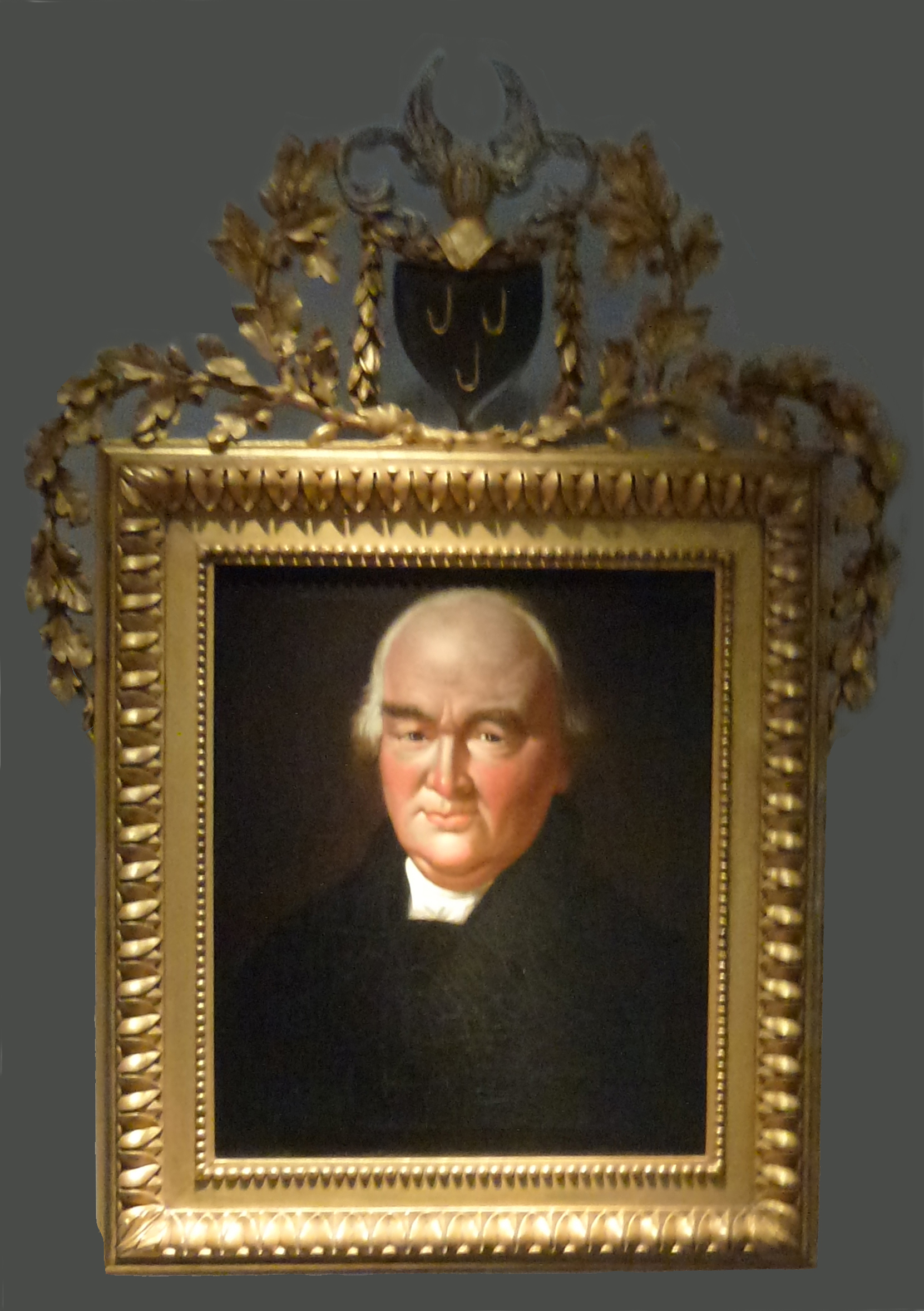 Portret van Pieter Melvill van Carnbee (1743-1826)